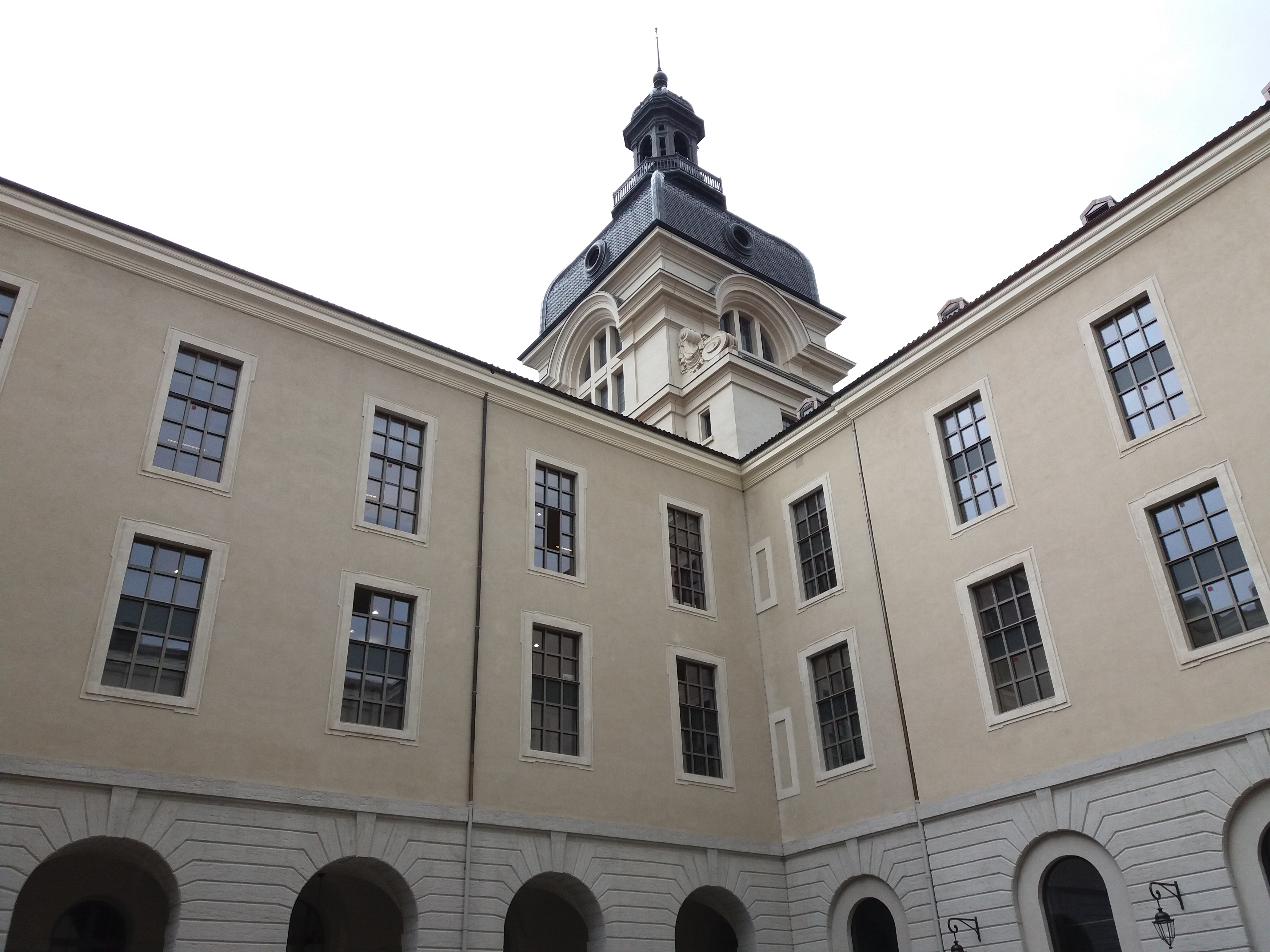 Cour Saint-Martin : angle sud-ouest.